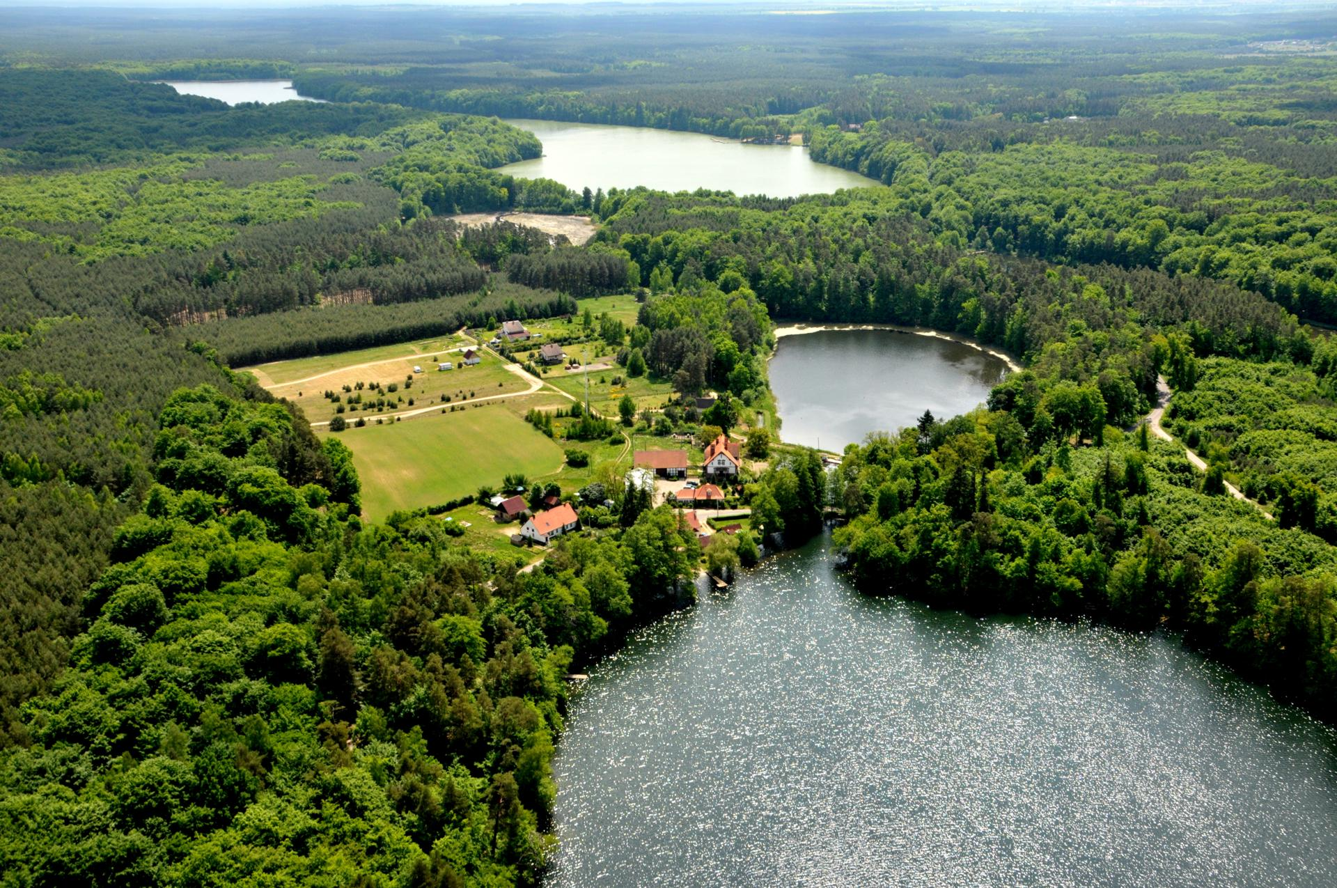 Lipy z lotu ptaka